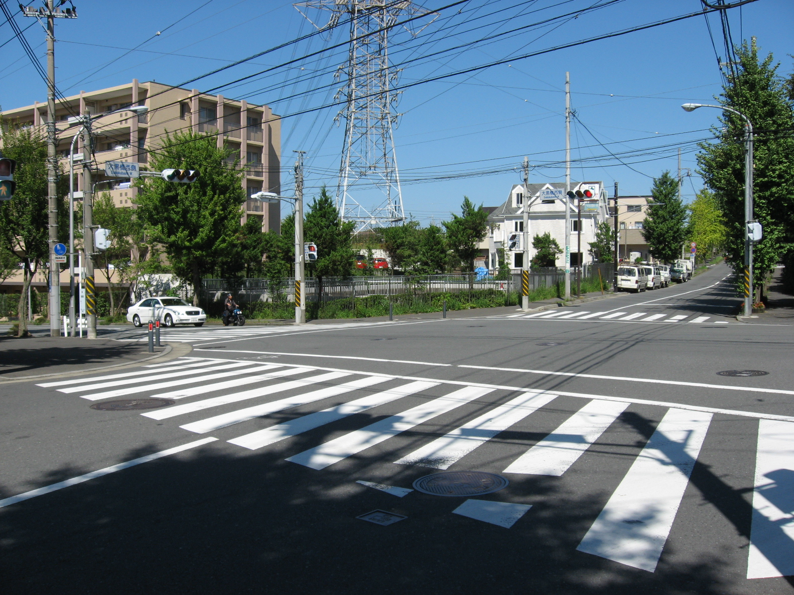 大黒橋西側交差点